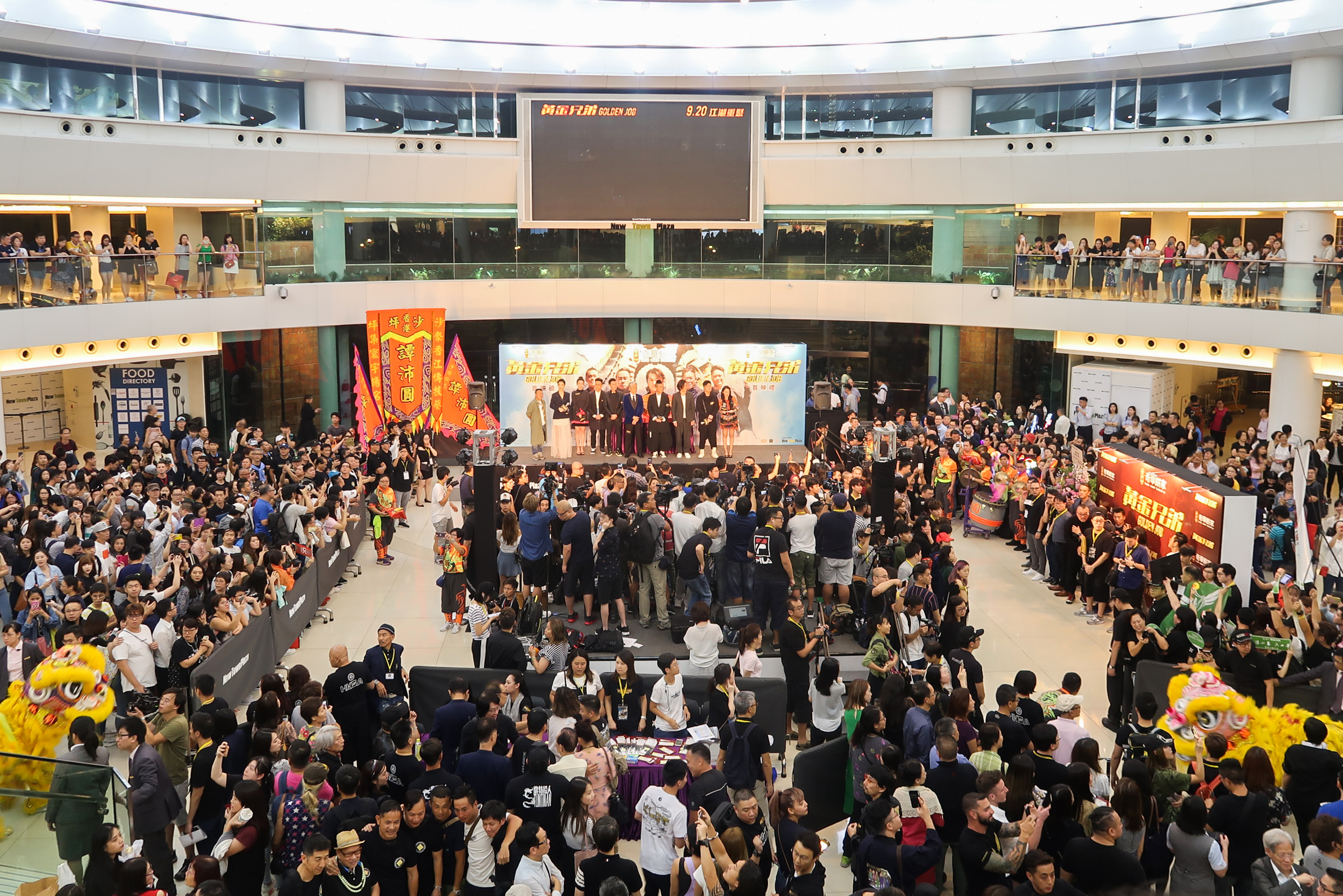 Golden Job premire in Hong Kong